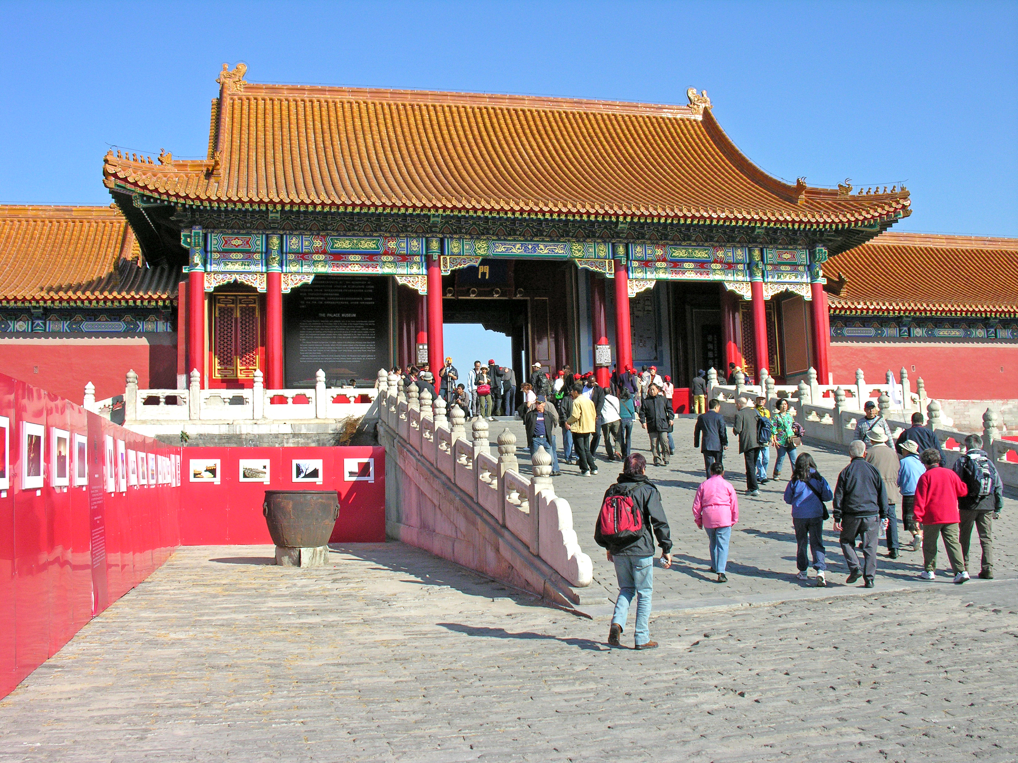 China-6163